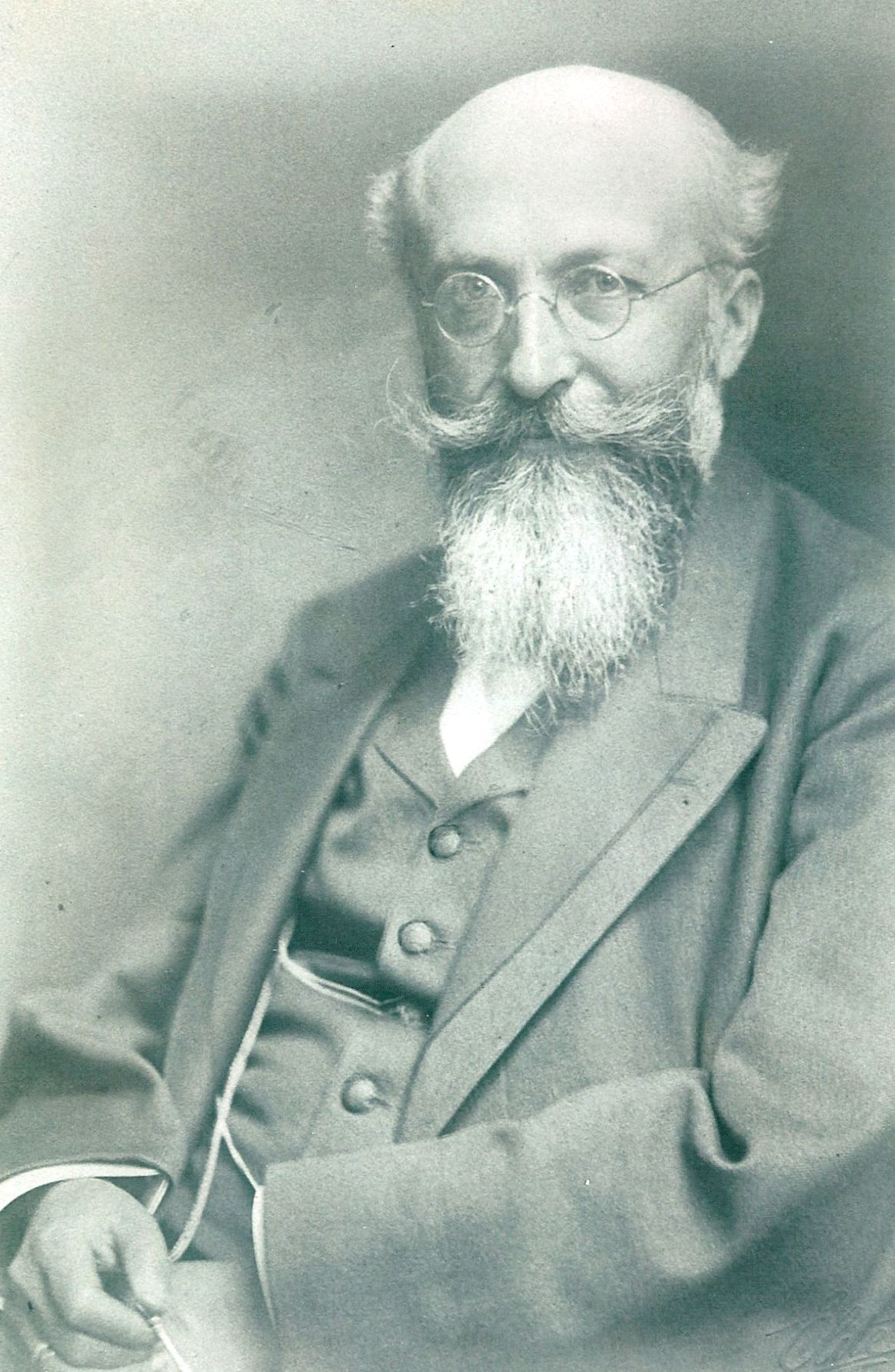 Dr.Hermann Müller (Sagan), Mitglied des Reichstages